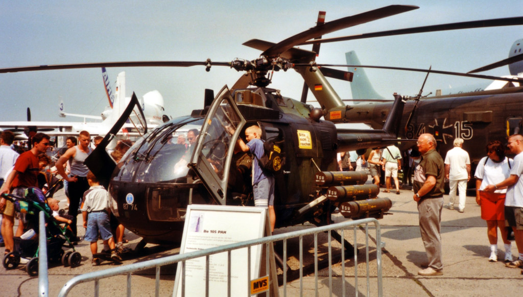 Bo 105 PAH, ILA 2000 in Berlin